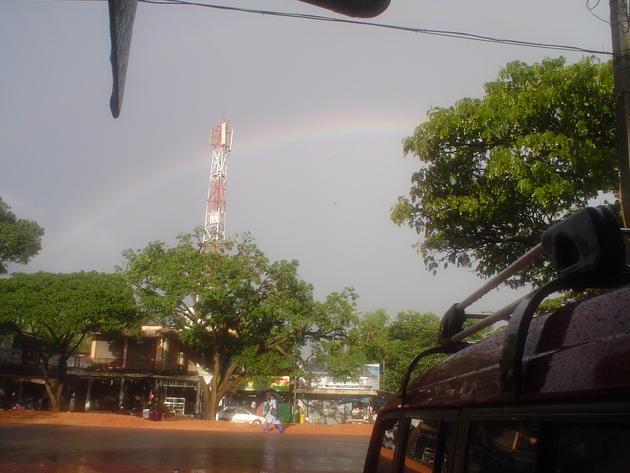 മഴവില്ല്